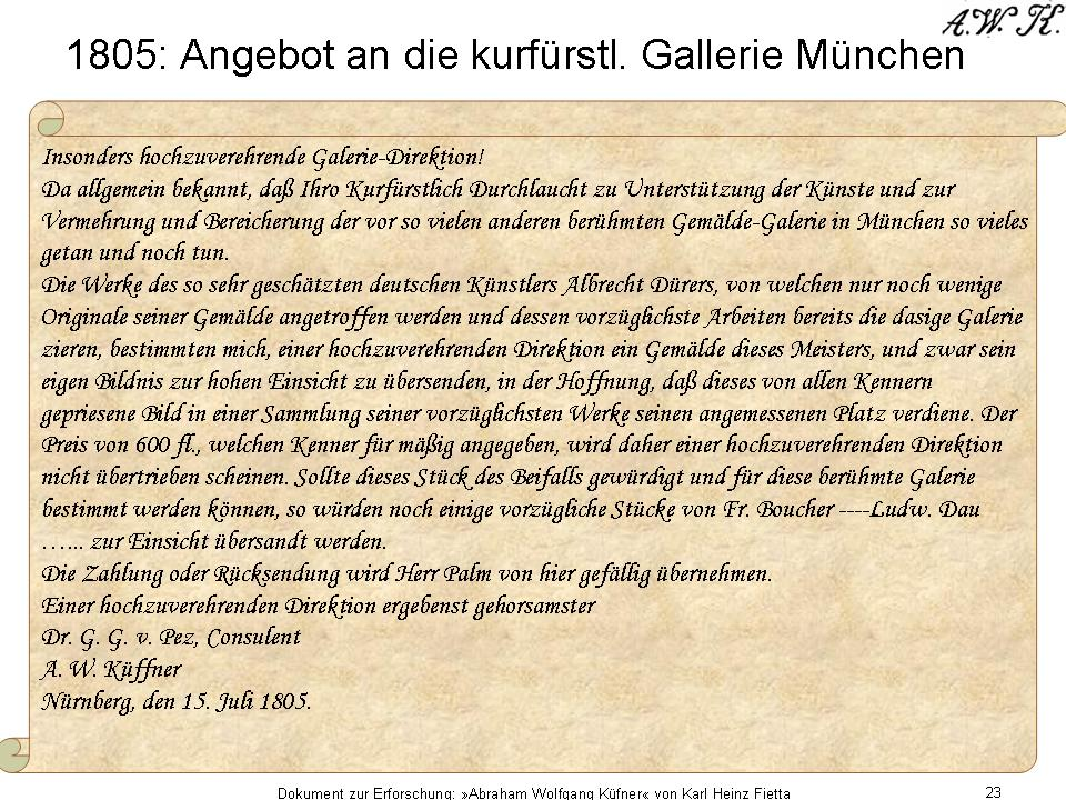 Abschrift des Angebot-Schreibens an die kurfürstliche Galleriedirektion in München